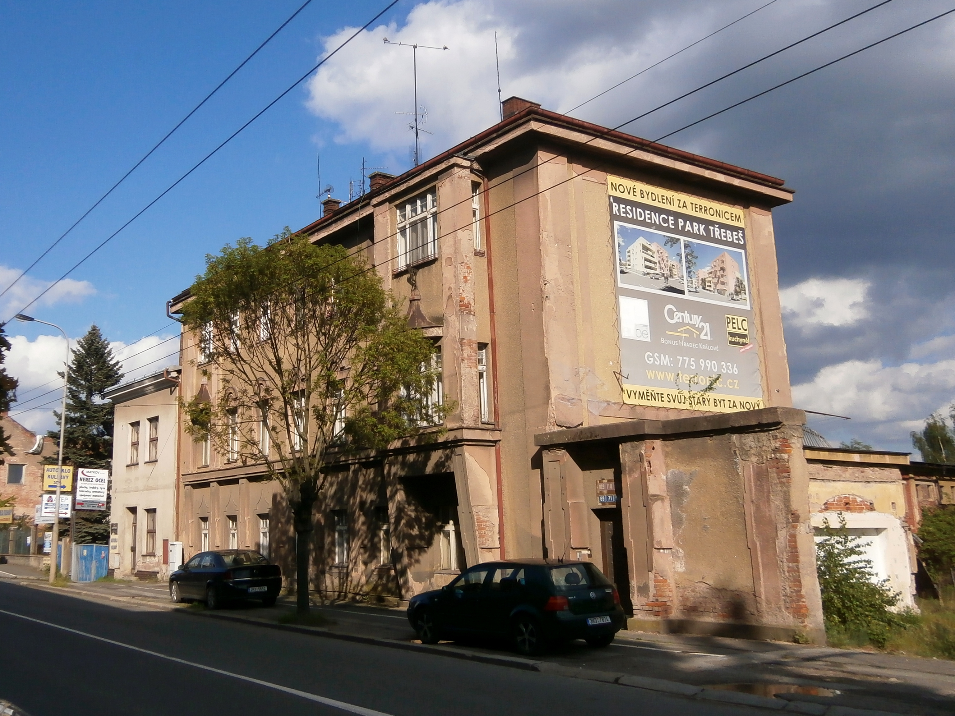 Pražská třída čp. 111